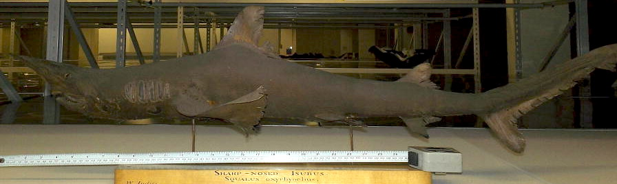 Requin bécune (Isogomphodon oxyrhynchus) au musée d'histoire naturelle de Londres. BMNH 1843.2.1.7 File:Isogomphodon oxyrhynchus BMNH 1843.2.1.7.jpg by Natural History Museum Derivative work - Œuvre dérivée : Abujoy